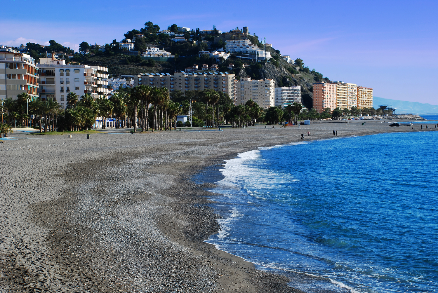 Almuñécar